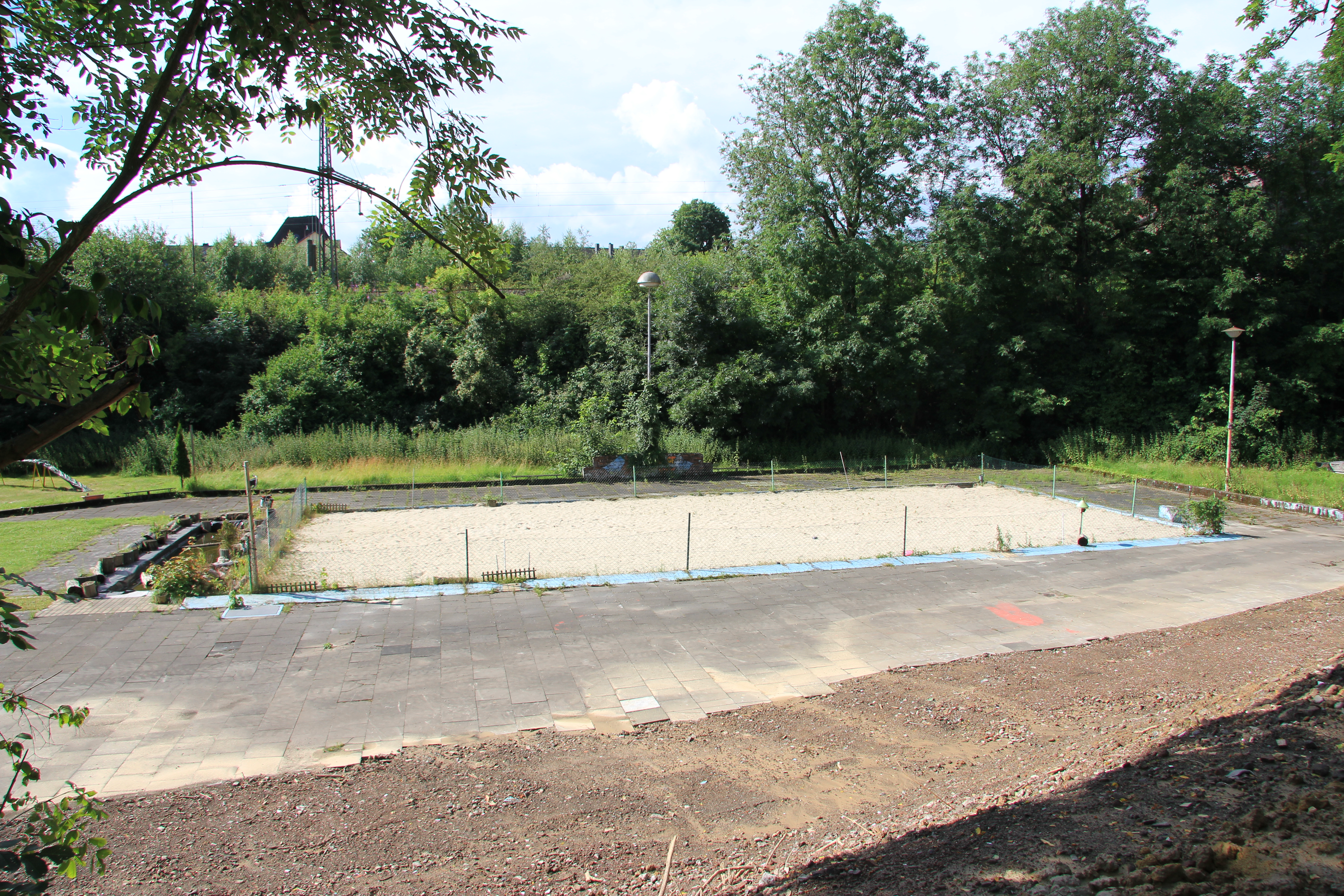 Überreste des ehemaligen Freibades Schallacker in Dortmund-Hörde